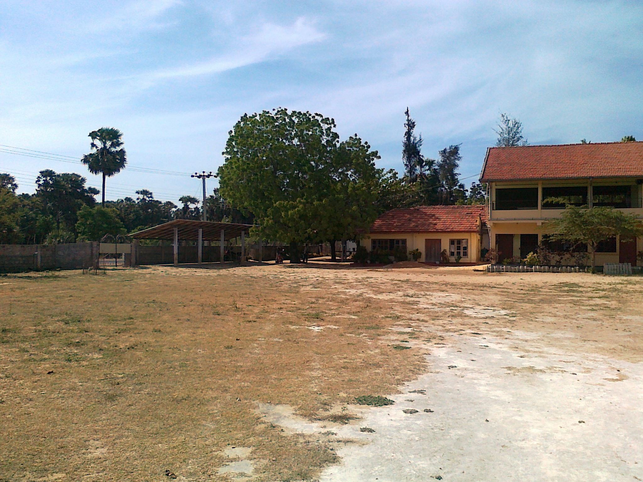 யாழ் கச்சாய் அரசினர் தமிழ் கலவன் பாடசாலை.